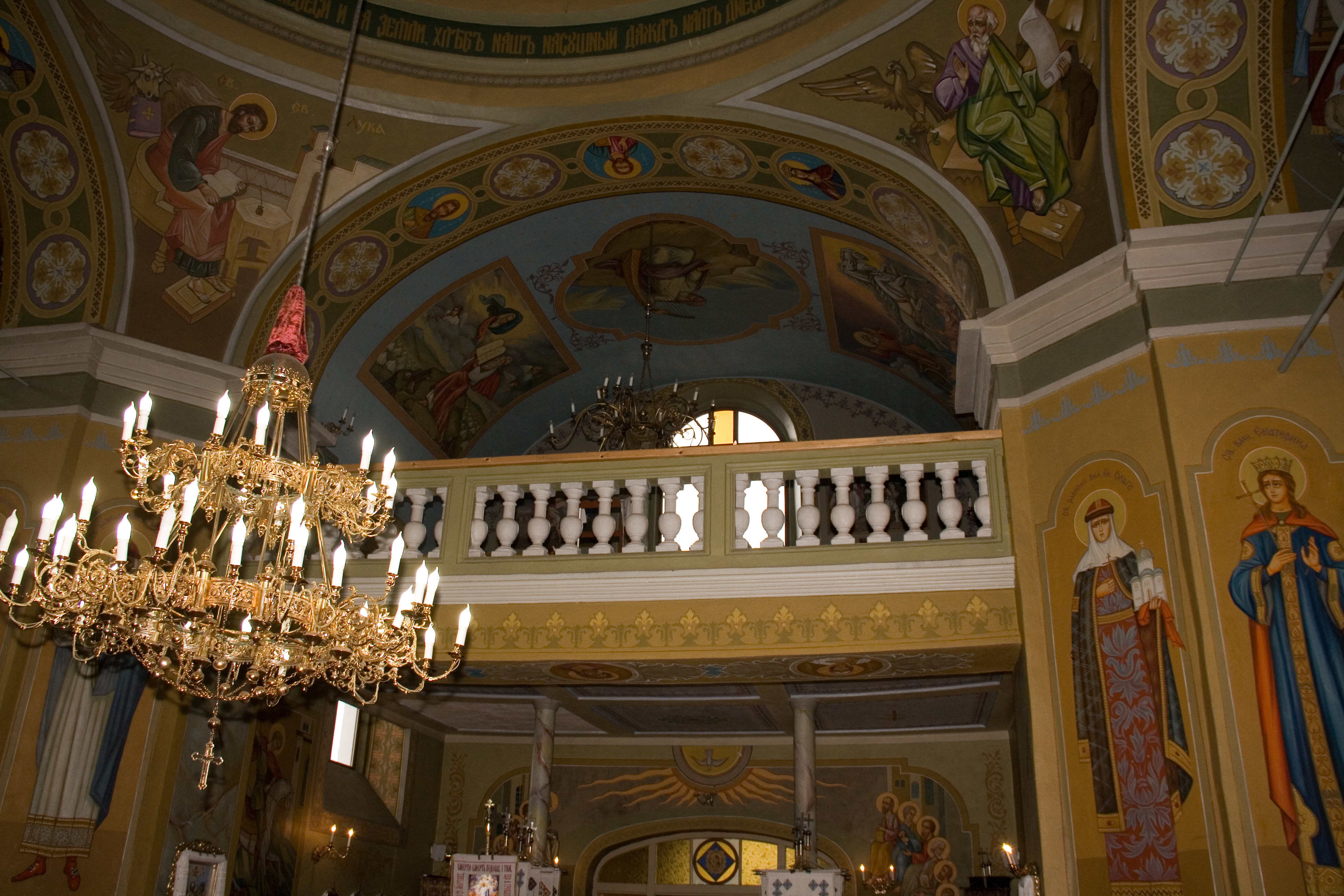 Інтер'єр православного храму с. Мужиловичі. Хори